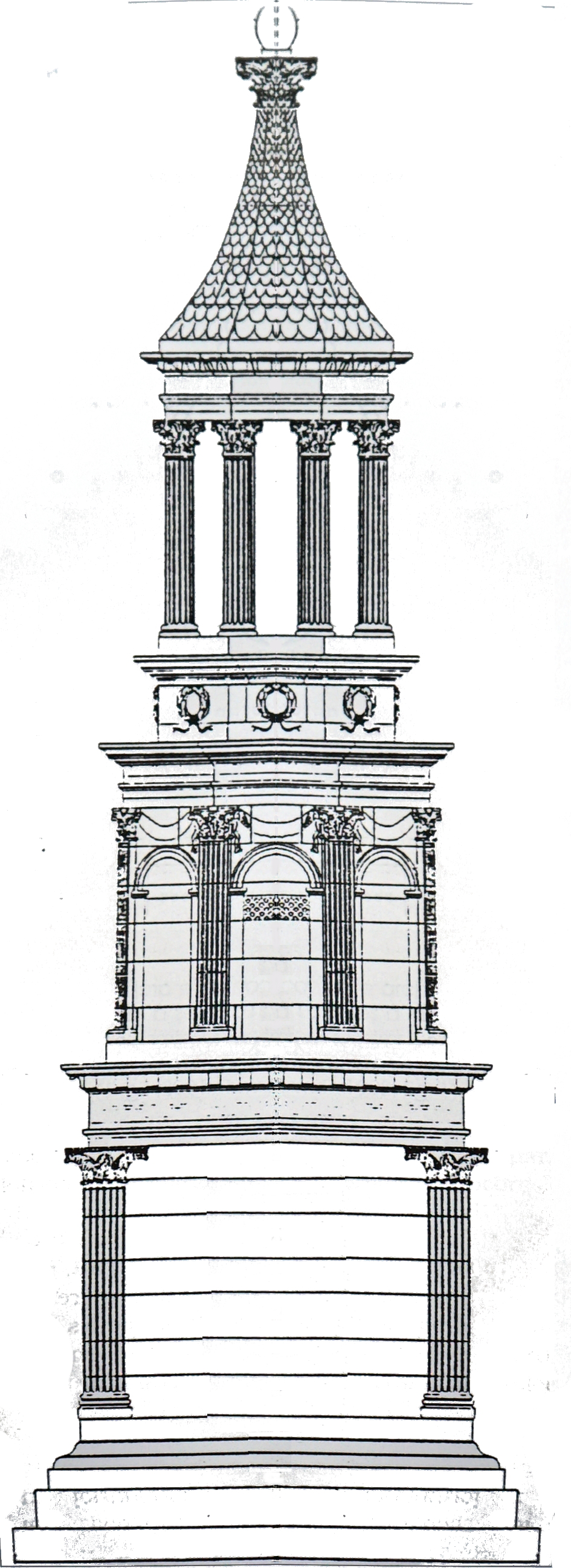 découvert lors des fouilles sur le Site archéologique de Faverolles.